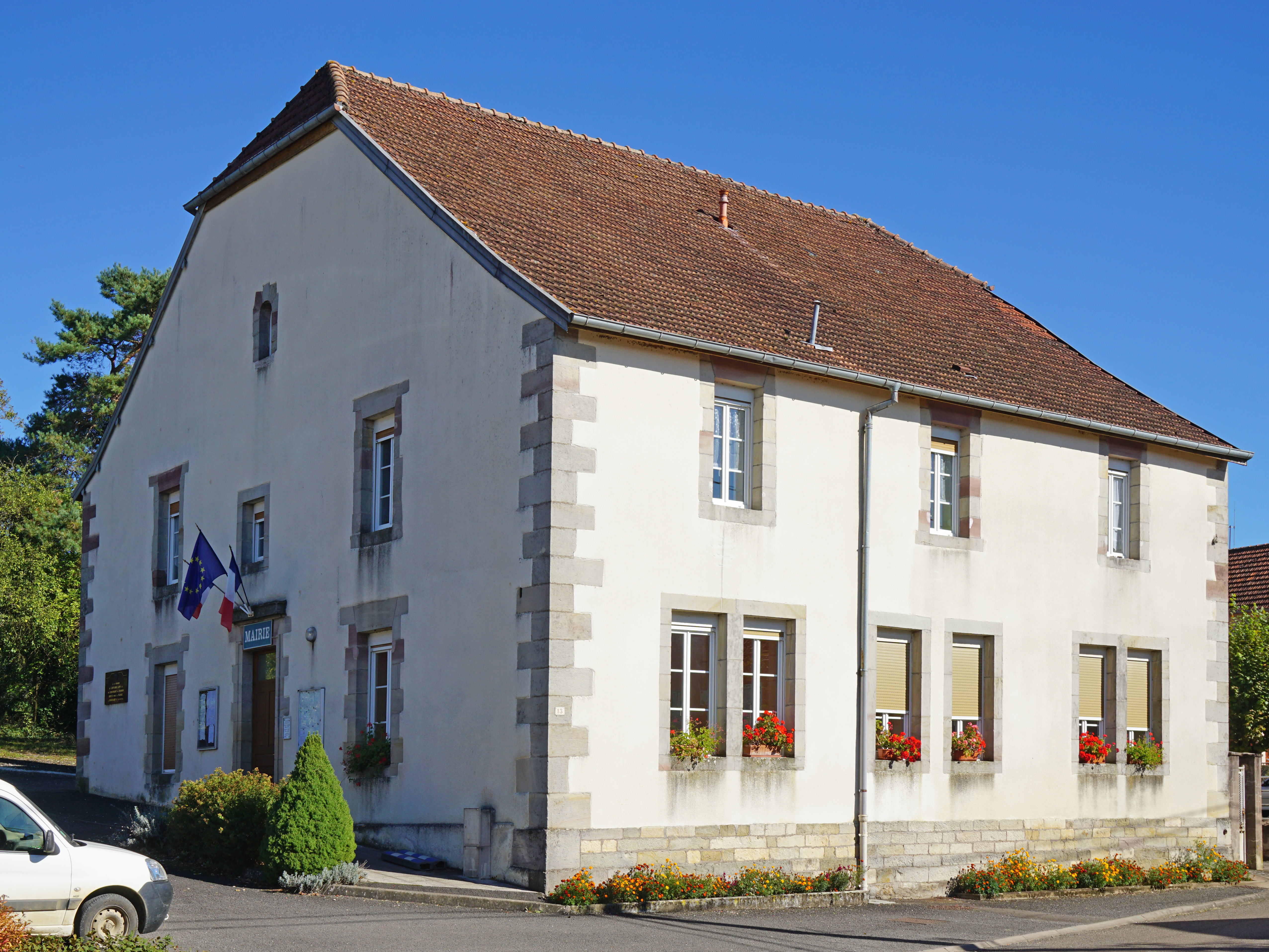 La mairie de Pomoy.